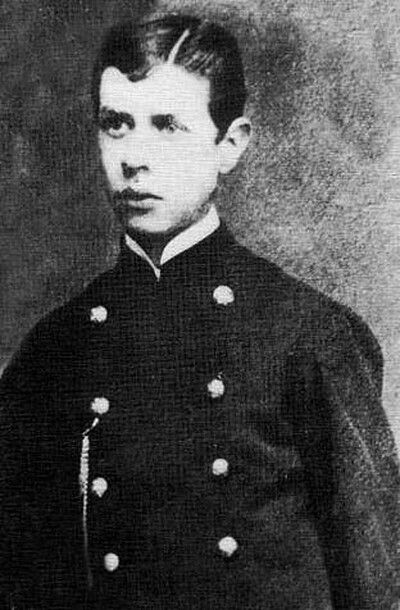 Arturo Pérez Canto (n. Santiago de Chile; 26 de noviembre de 1864 - m. Combate de Concepción; 9 de julio de 1882) Militar chileno. Subteniente de la 4° compañía del batallón Chacabuco y héroe del Combate de Concepción.